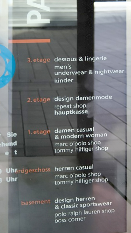 Schild eines Bekleidungshauses